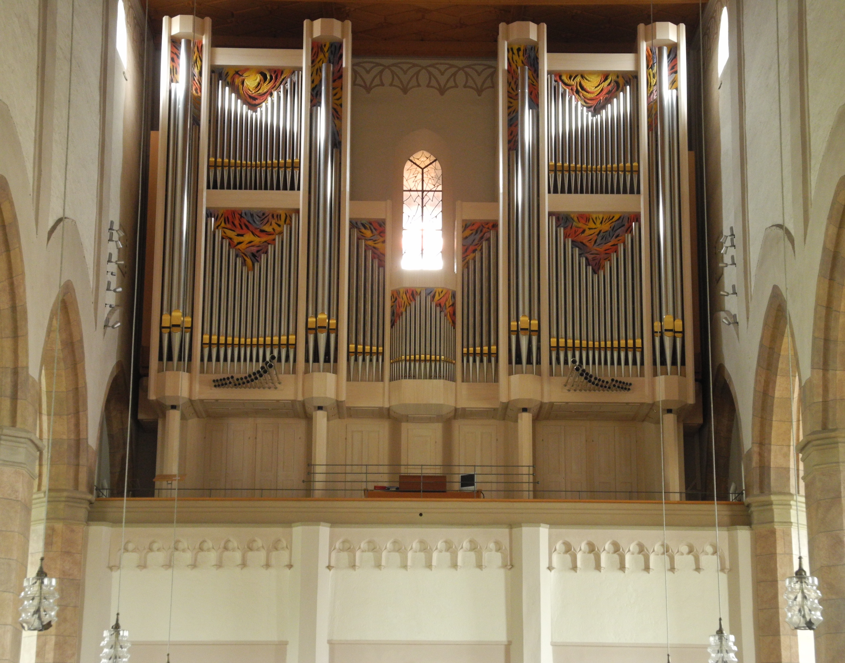 Orgel von Eisenbarth (50-III-P) 2007